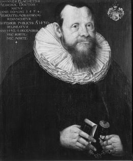 Gemälde in der Professorengalerie Tübingen